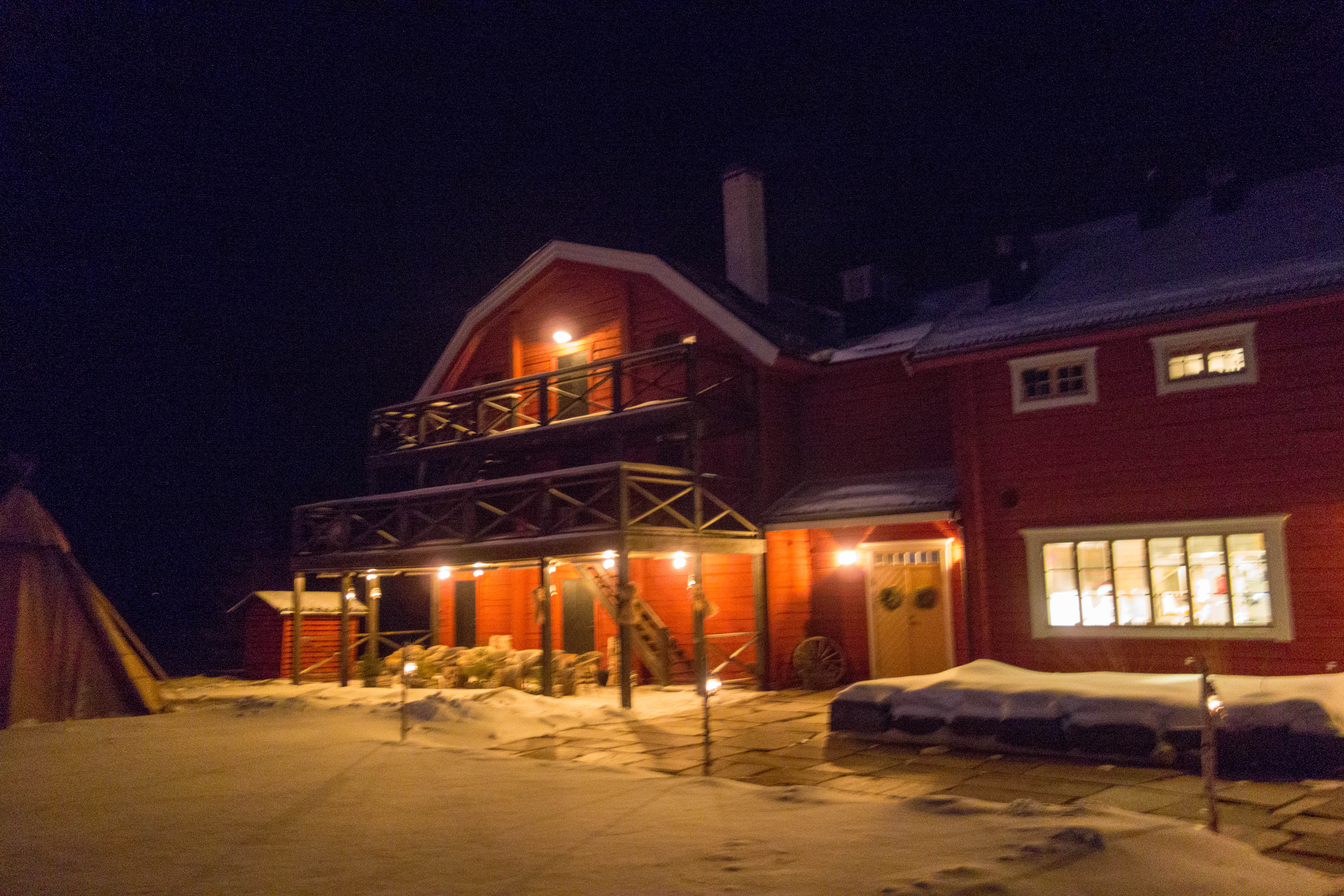 Fäviken